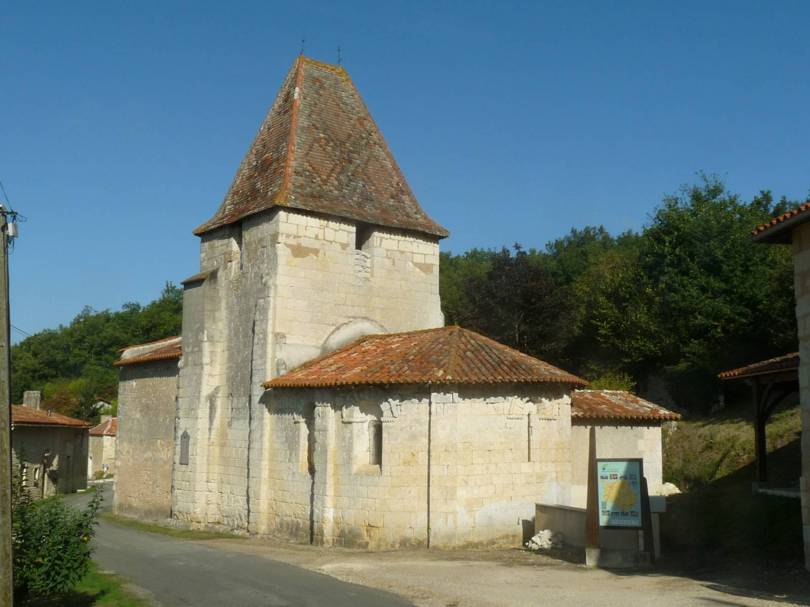 église de St-Avit (16), France